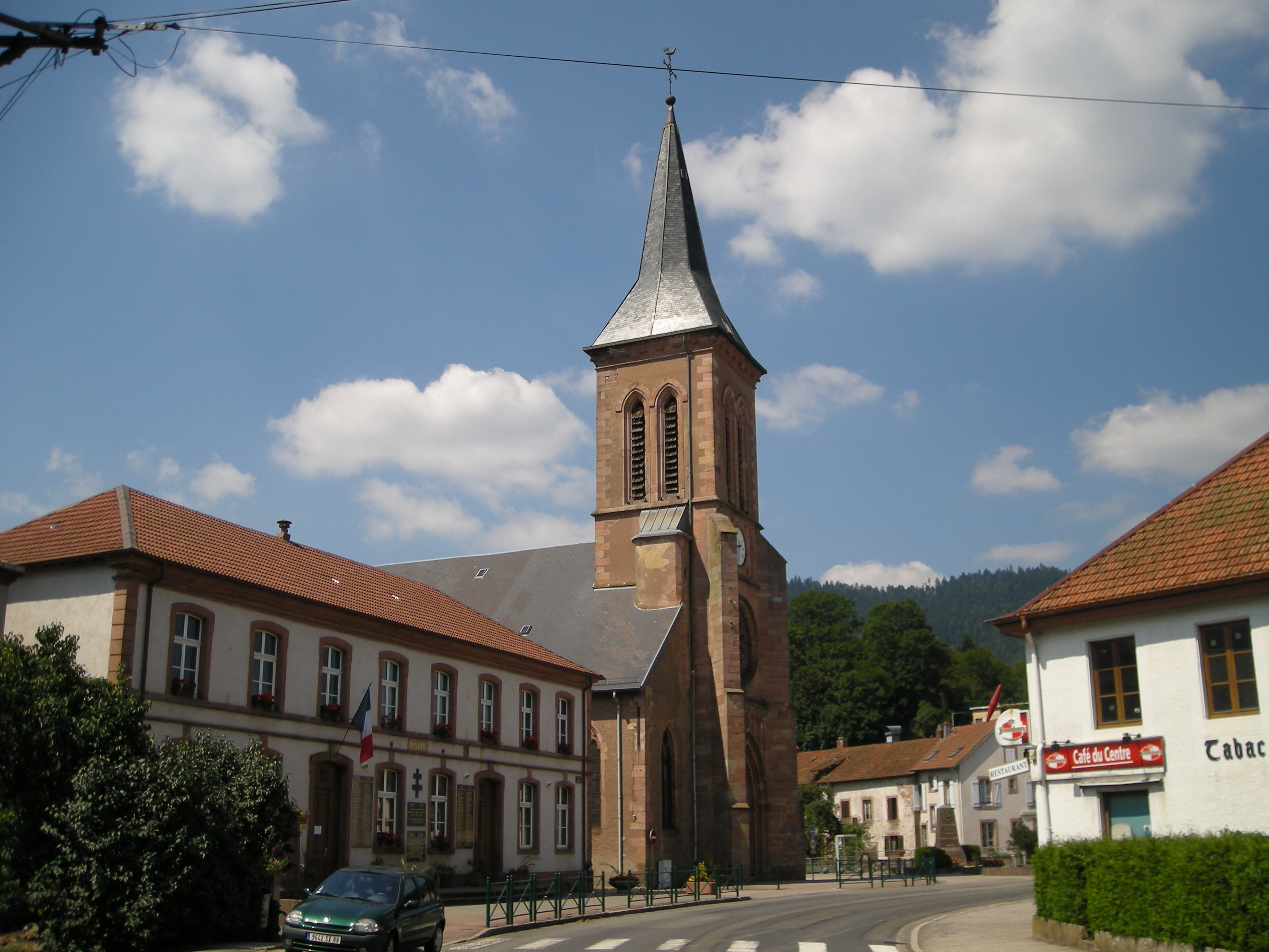 Mairie et église de La Petite Raon (Vosges, France)